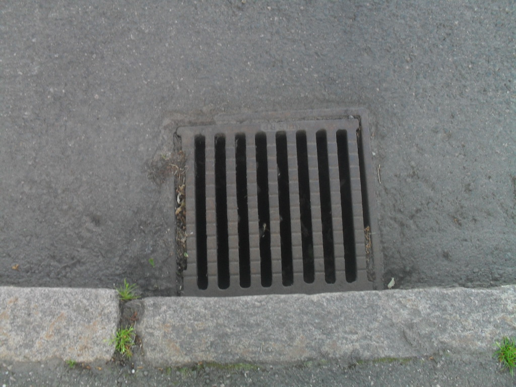 En gatubrunn